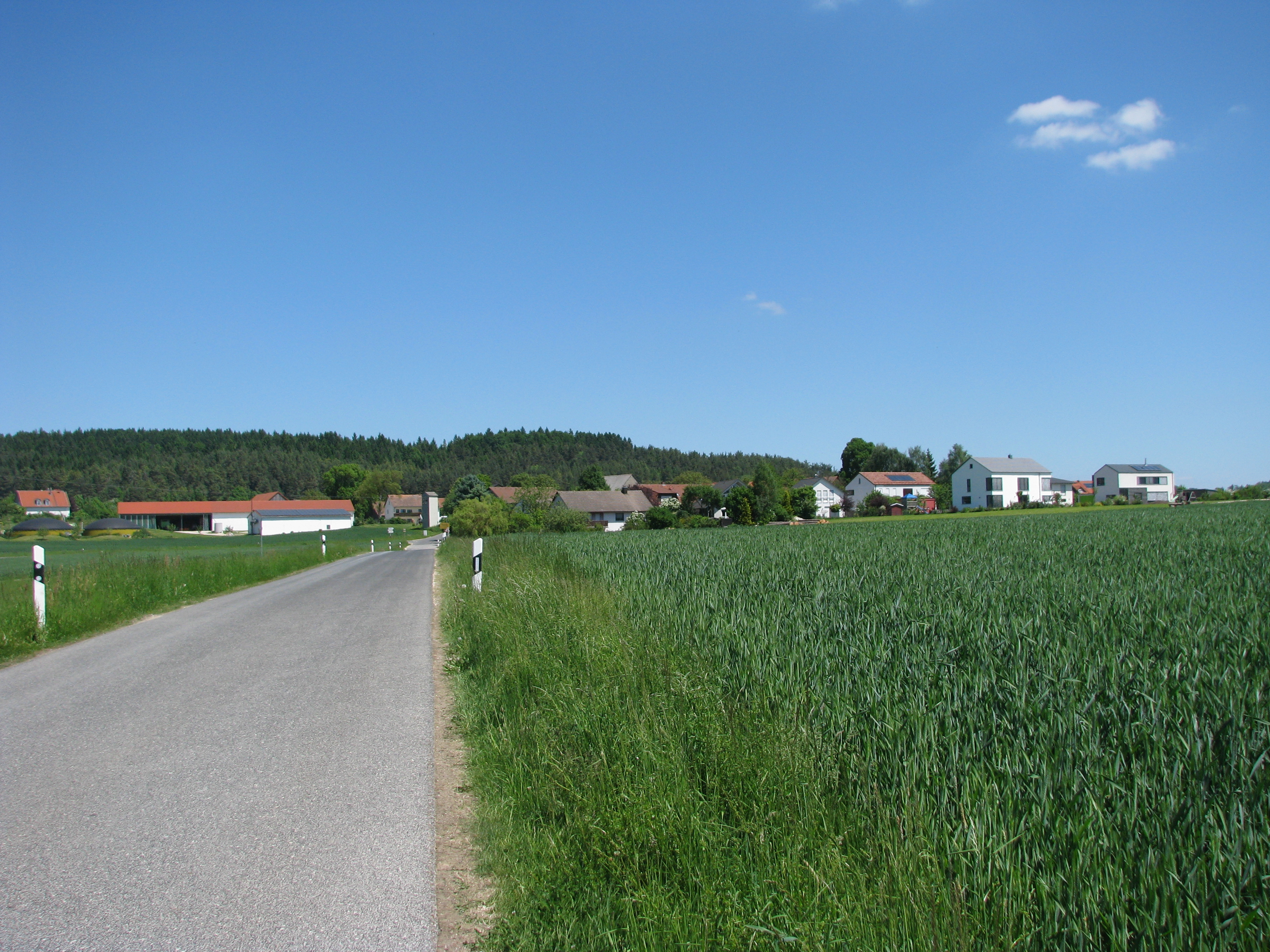 Hilzhofen, Gemeindeteil der Gemeinde Hilzhofen im Landkreis Neumarkt i. d. Opf., Ortsansicht